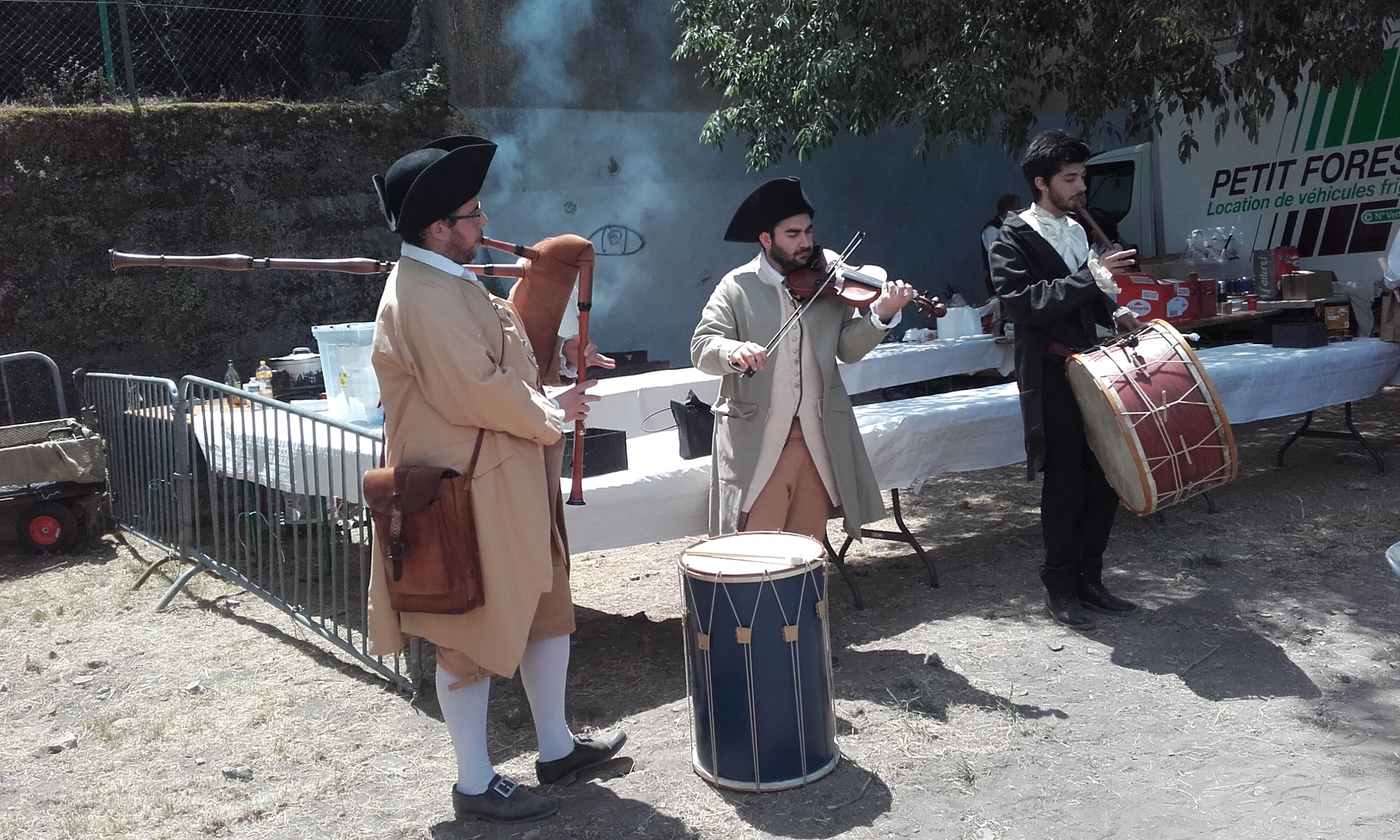 Var, Besse-sur-Issole, Journée du 18e siècle le 15 juin 2019, par l'Association Duels théâtraux company